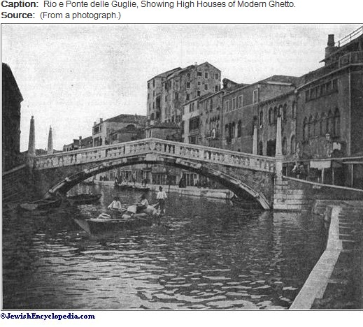 Venice Ghetto